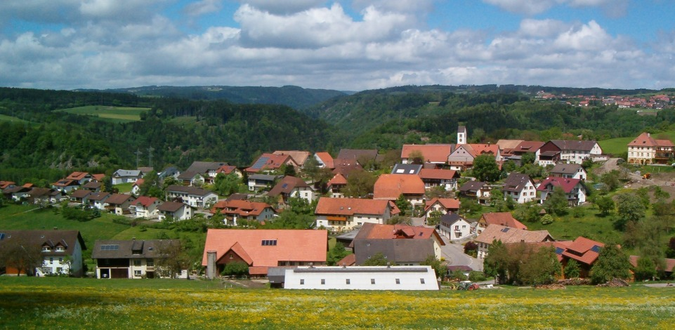 Aichen, im Hintergrund, jenseits des Schlüchttals, der Weilheimer Berg (links oben) und das Schwarzatal (mitte oben) sowie der Ortsteil Berau (rechts oben), Gemeinde Ühlingen-Birkendorft